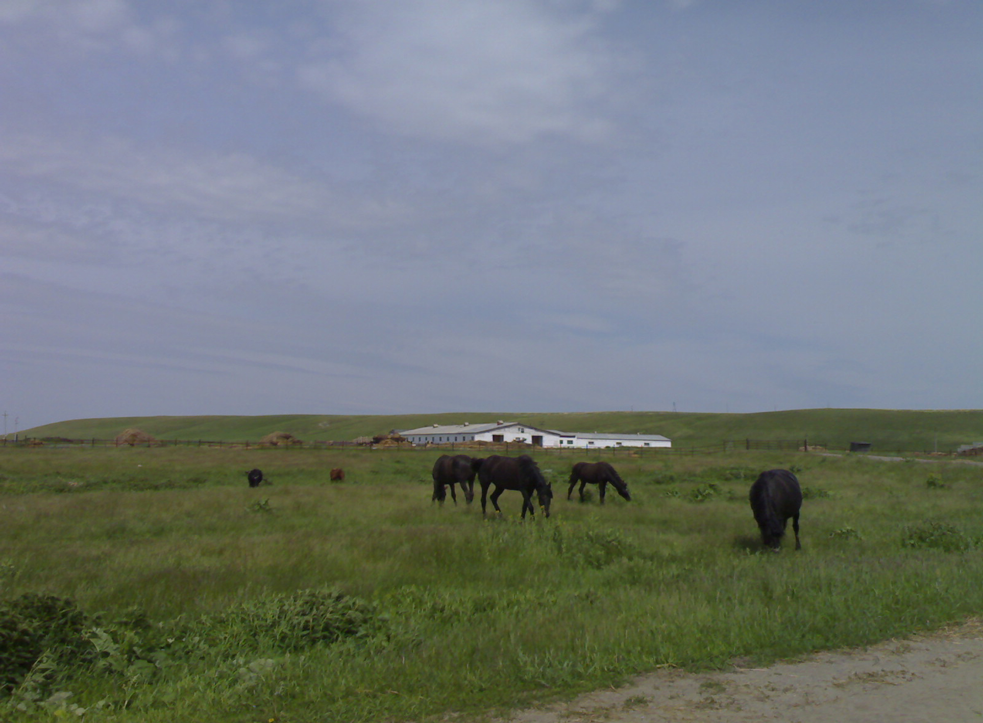 Село Афонькино Казанского района. Сельское хозяйство